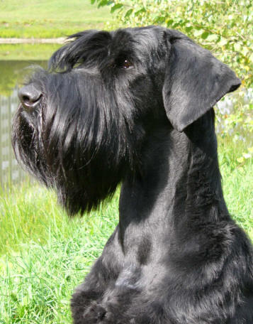 Nev Lemar Barbara